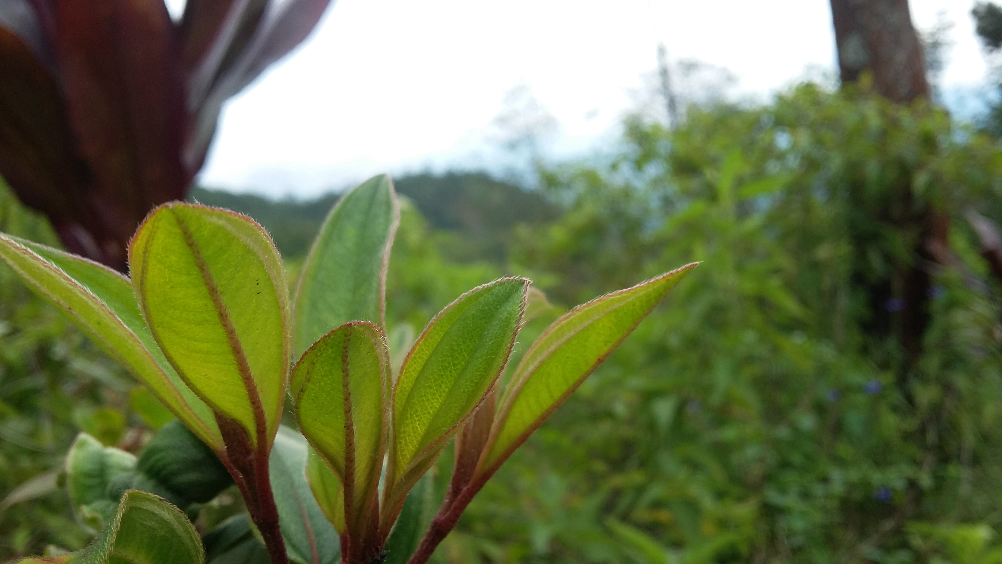 Jawa: godhong ana ing gunung iki kajupuk pas ana ing gunung daerah wonogiri